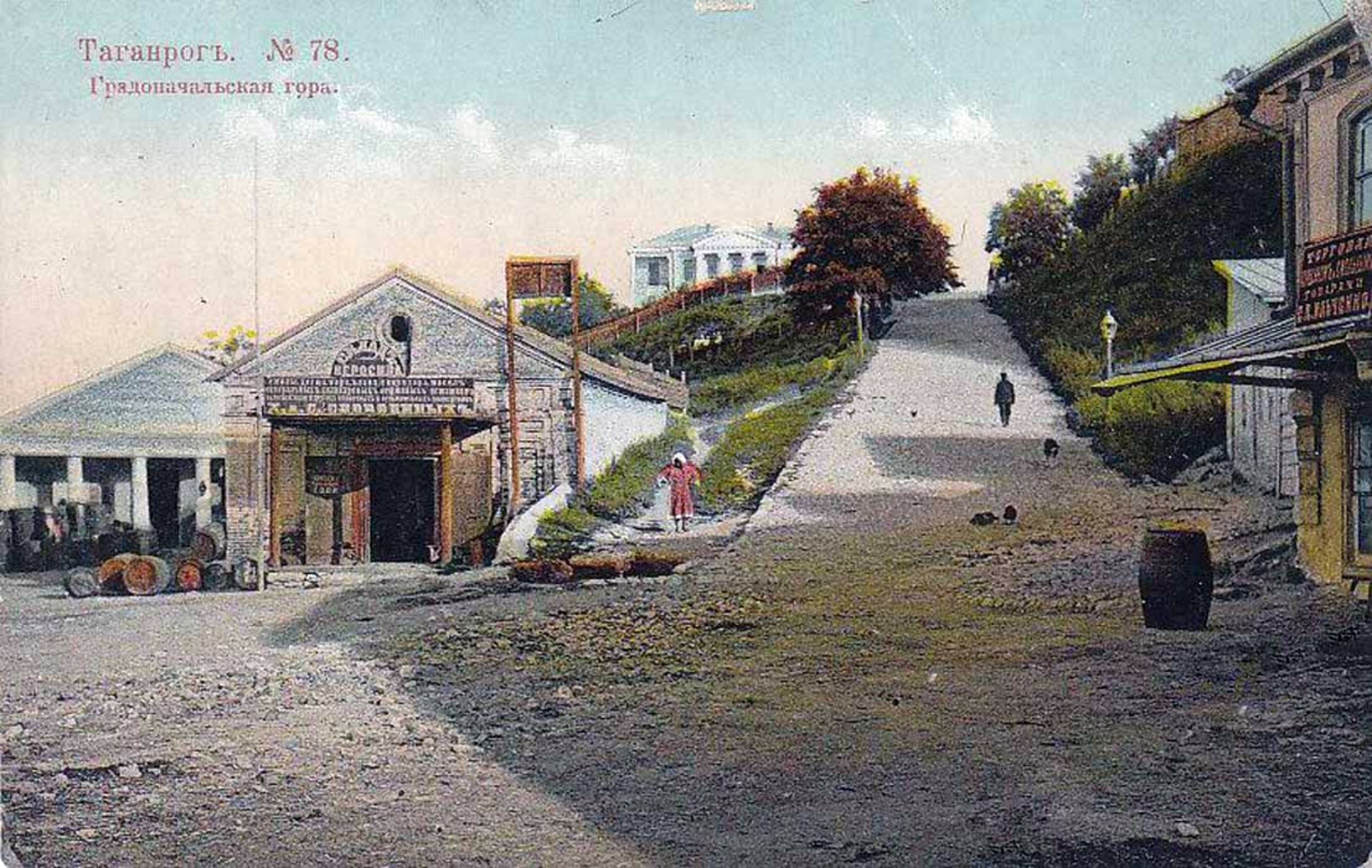 Градоначальнический спуск, Таганрог. Открытка издания тов-ва "К. П." "Градоначальская гора", № 78.